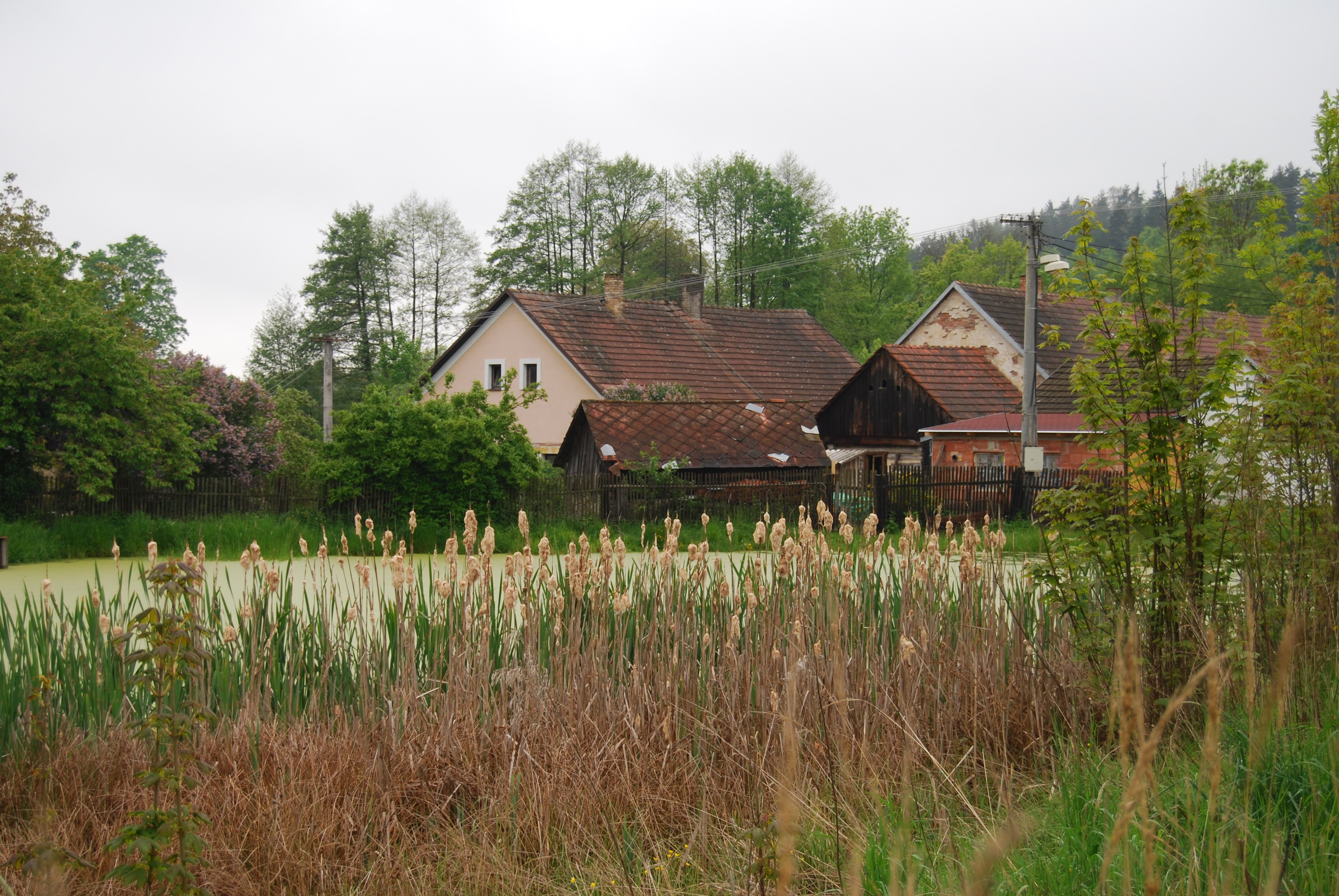 Pohled na část vesnice a čp. 3. Klisín je část obce Milevsko v okresu Písek v Jihočeském kraji. Česká republika. - Google Maps - Google Earth